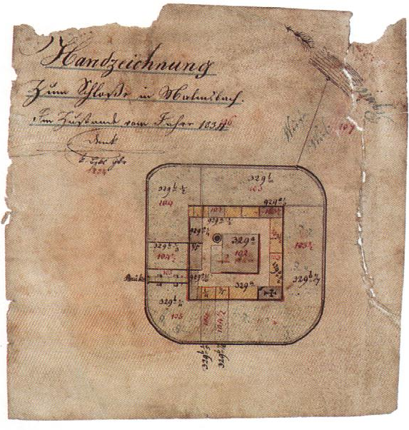 Scan eines Lageplans von Schloss Malmsbach von 1834